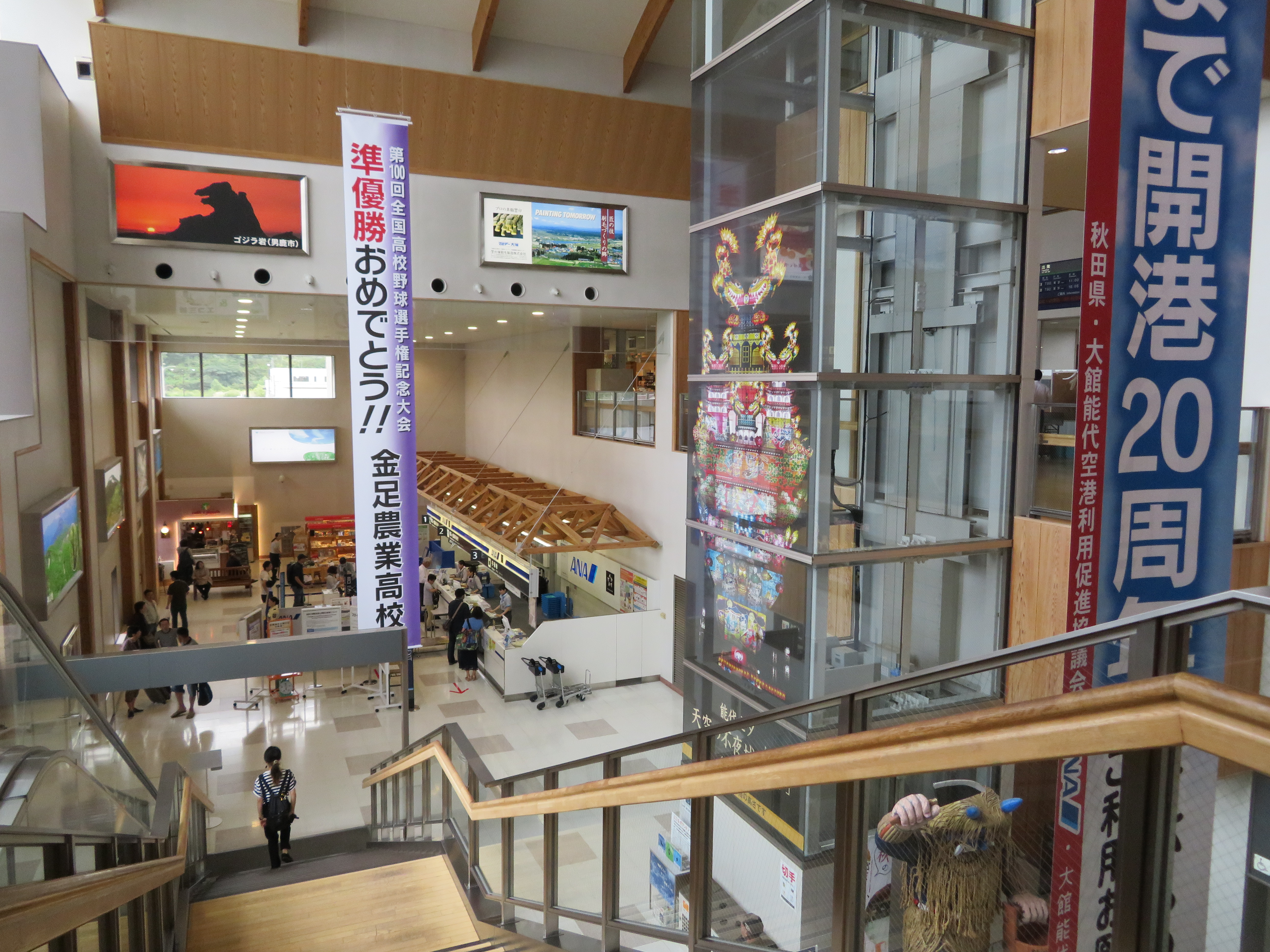 大館能代空港 １F チェックインロビー Canon PowerShot SX720 HS